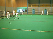 zelf gemaakt